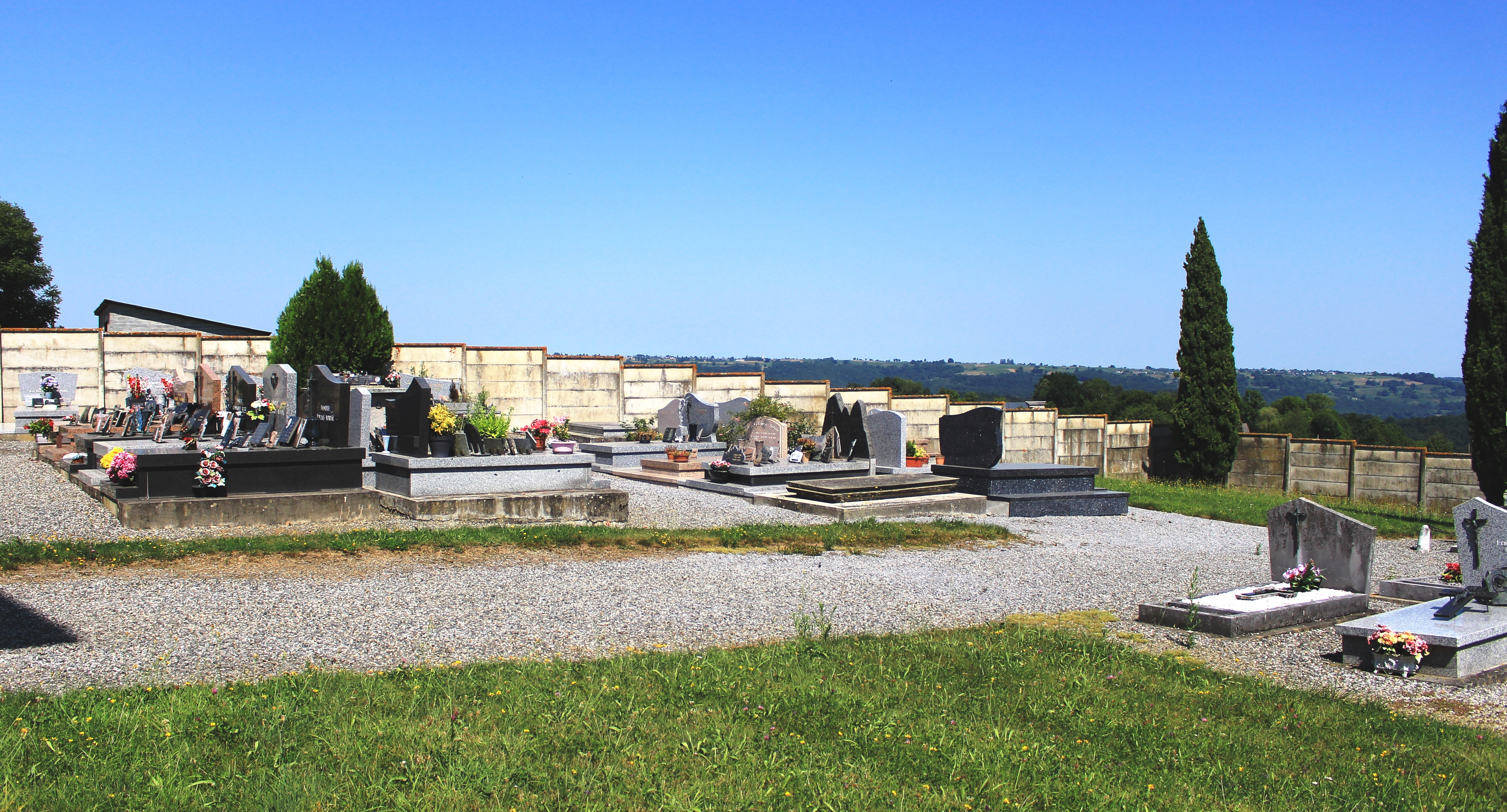 Cimetière de Sarlabous (Hautes-Pyrénées)